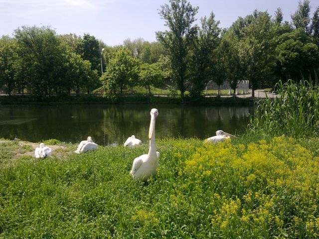 г. Ростов-на-Дону. В зоопарке (1)